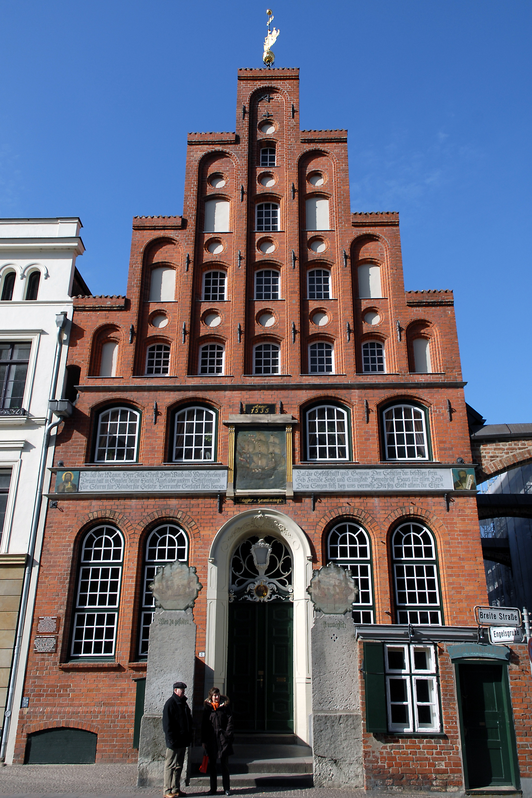 Schiffergesellschaft, Lübeck. Rechts und links des Eingangs die Beischlagwangen aus dem Jahr 1745.